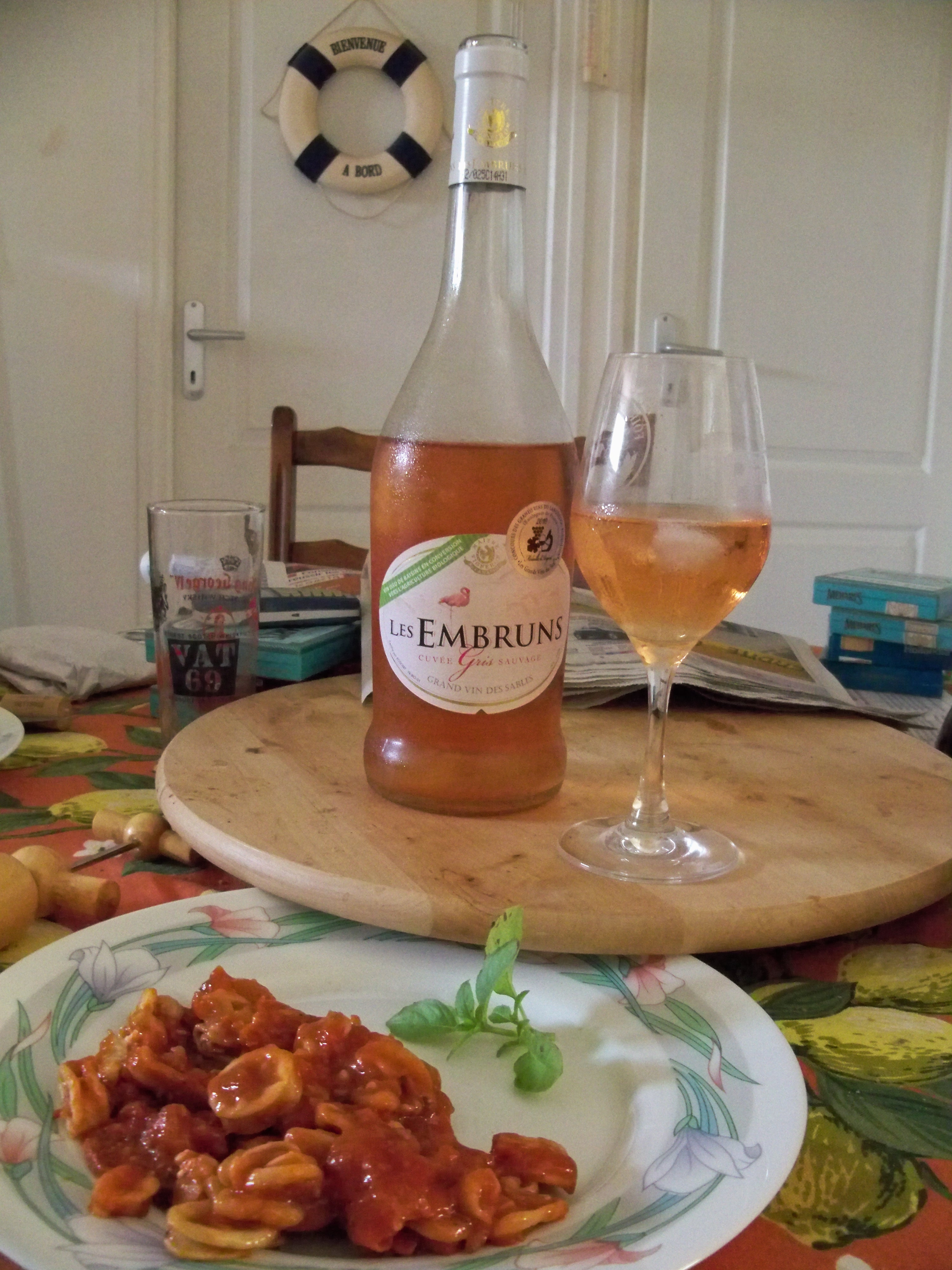 Les Embruns - Grand vin des Sables du Golf du Lion